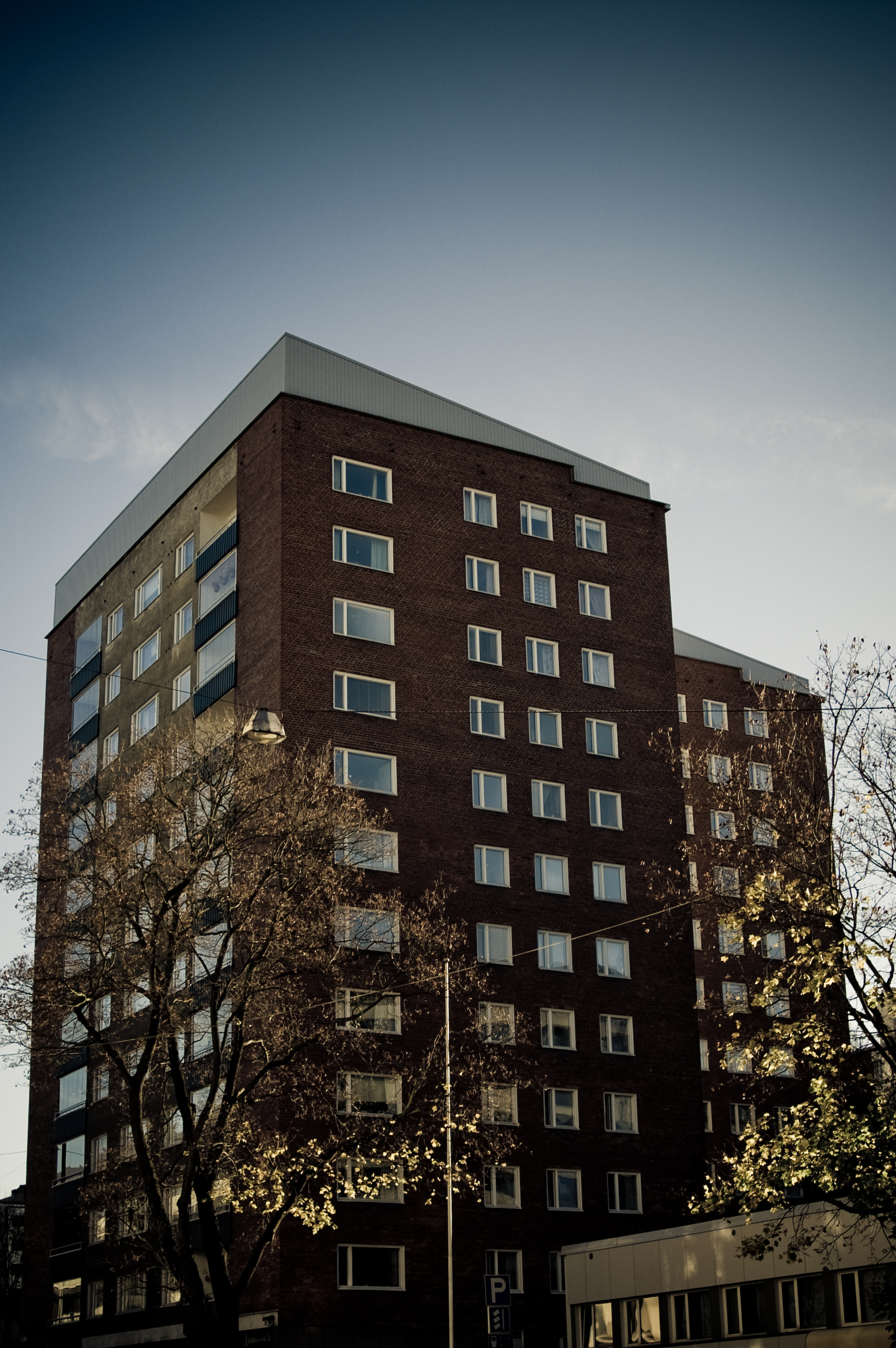 Humalistonkatu 16, Turku